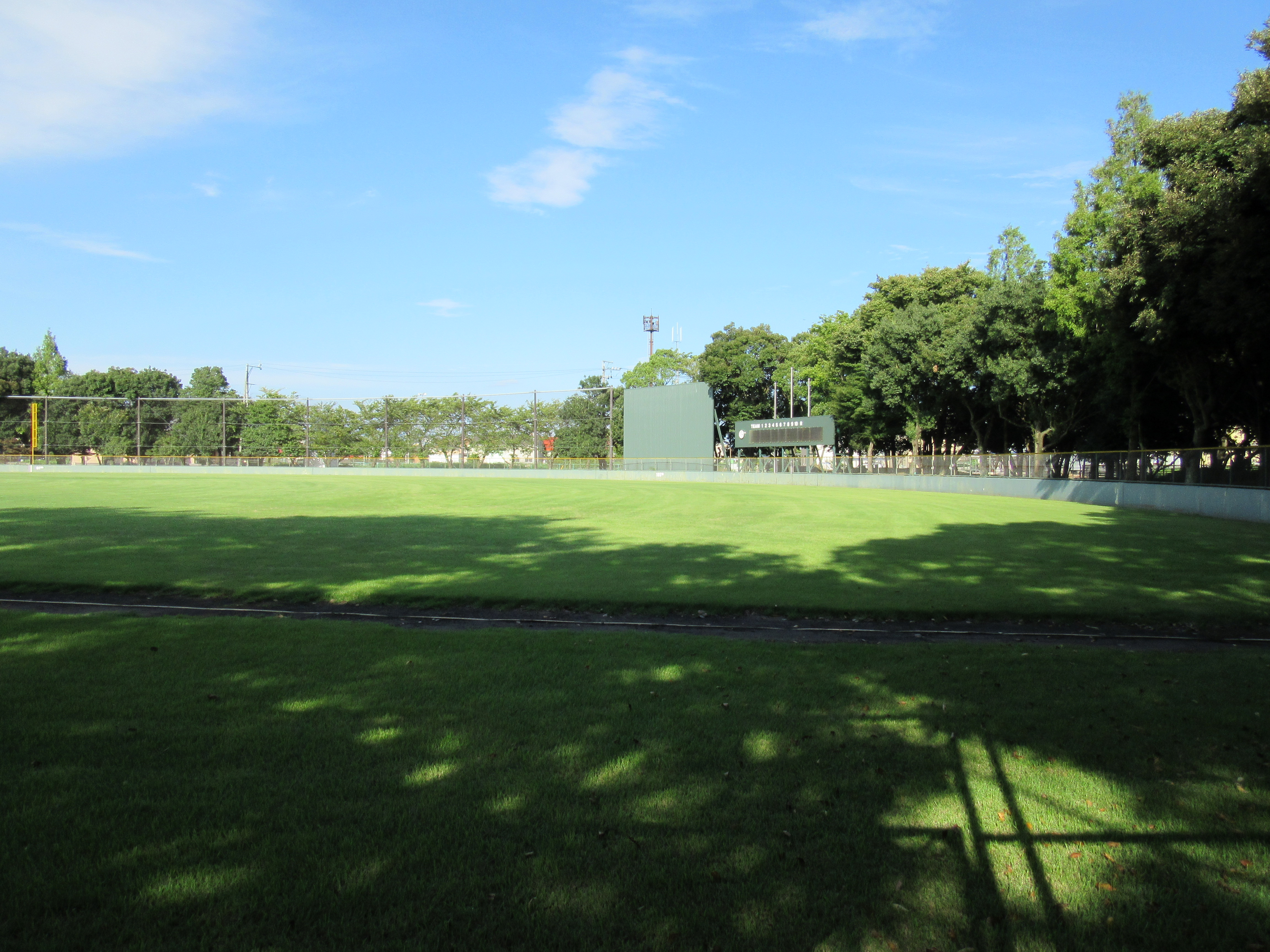 川島スポーツ公園野球場